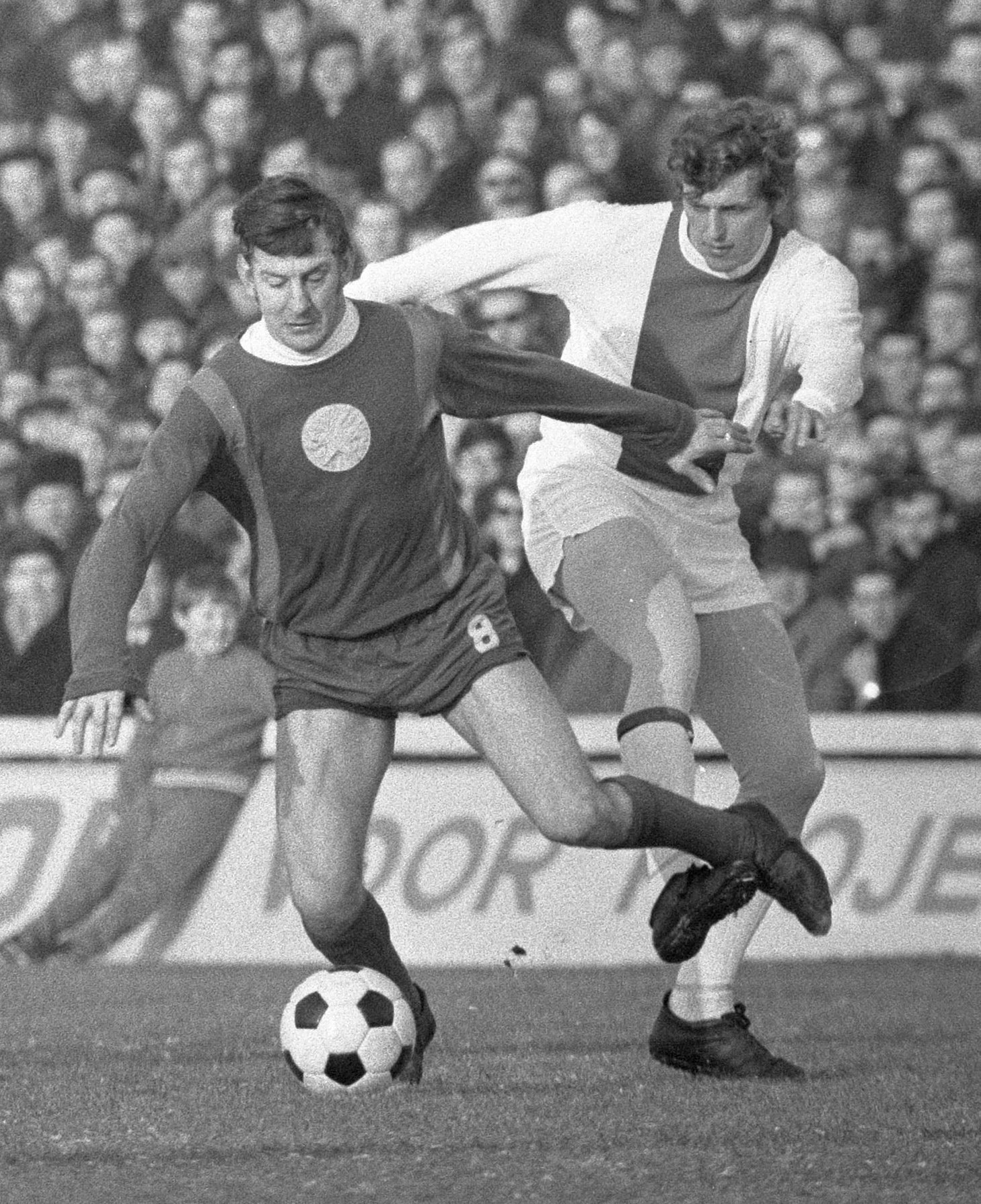 Collectie / Archief : Fotocollectie Anefo Reportage / Serie : [ onbekend ] Beschrijving : MVV tegen Ajax 1-1. Duel van Piet Keizer (rechts) en Co Prins Datum : 1 februari 1970 Locatie : Maastricht Trefwoorden : sport, voetbal Persoonsnaam : Keizer, Piet, Prins, Co Fotograaf : Koch, Eric / Anefo Auteursrechthebbende : Nationaal Archief Materiaalsoort : Negatief (zwart/wit) Nummer archiefinventaris : bekijk toegang 2.24.01.05 Bestanddeelnummer : 923-2053